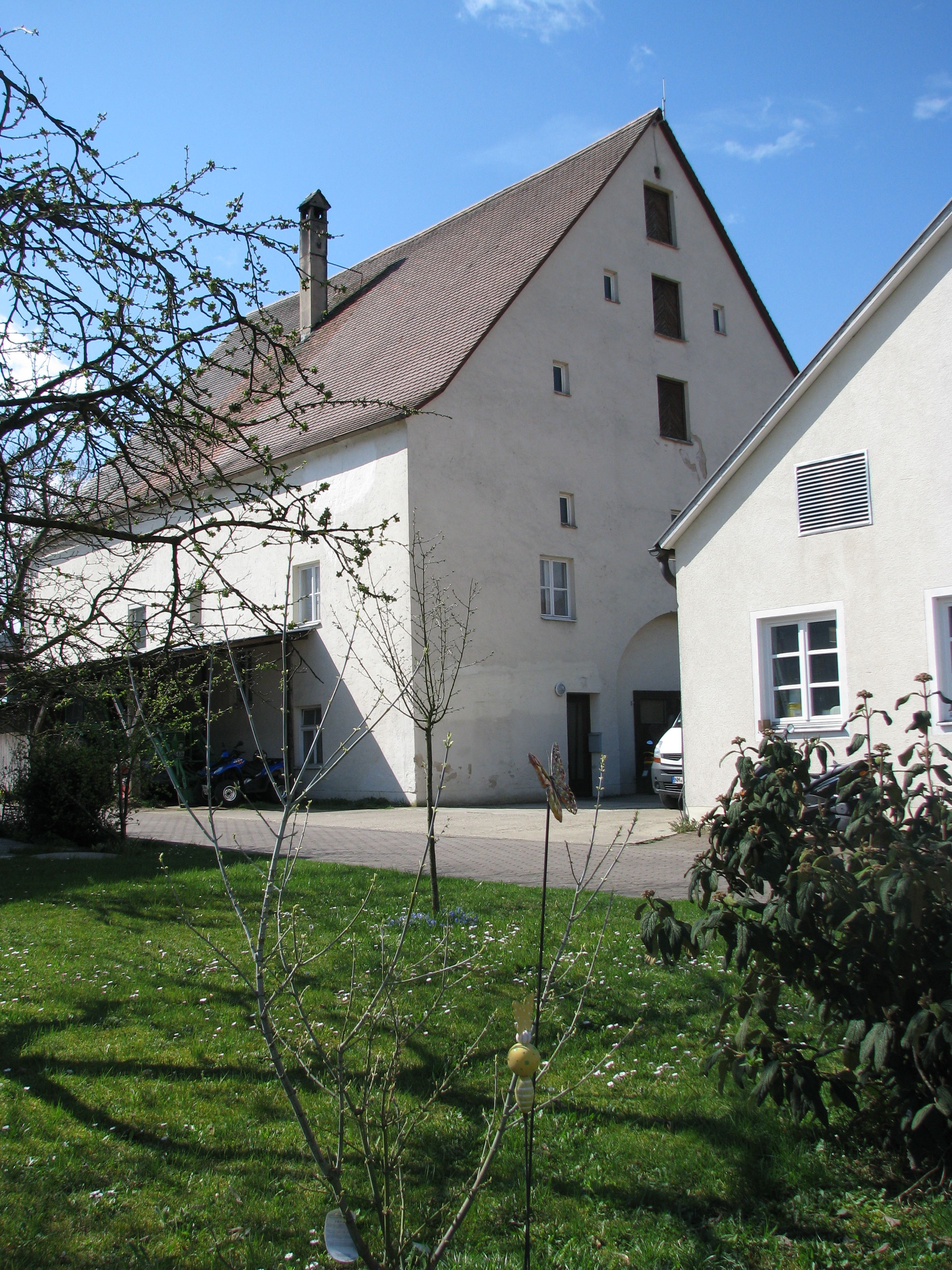 Erasbach, Landkreis Neumarkt in der Oberpfalz, Zehentstadel